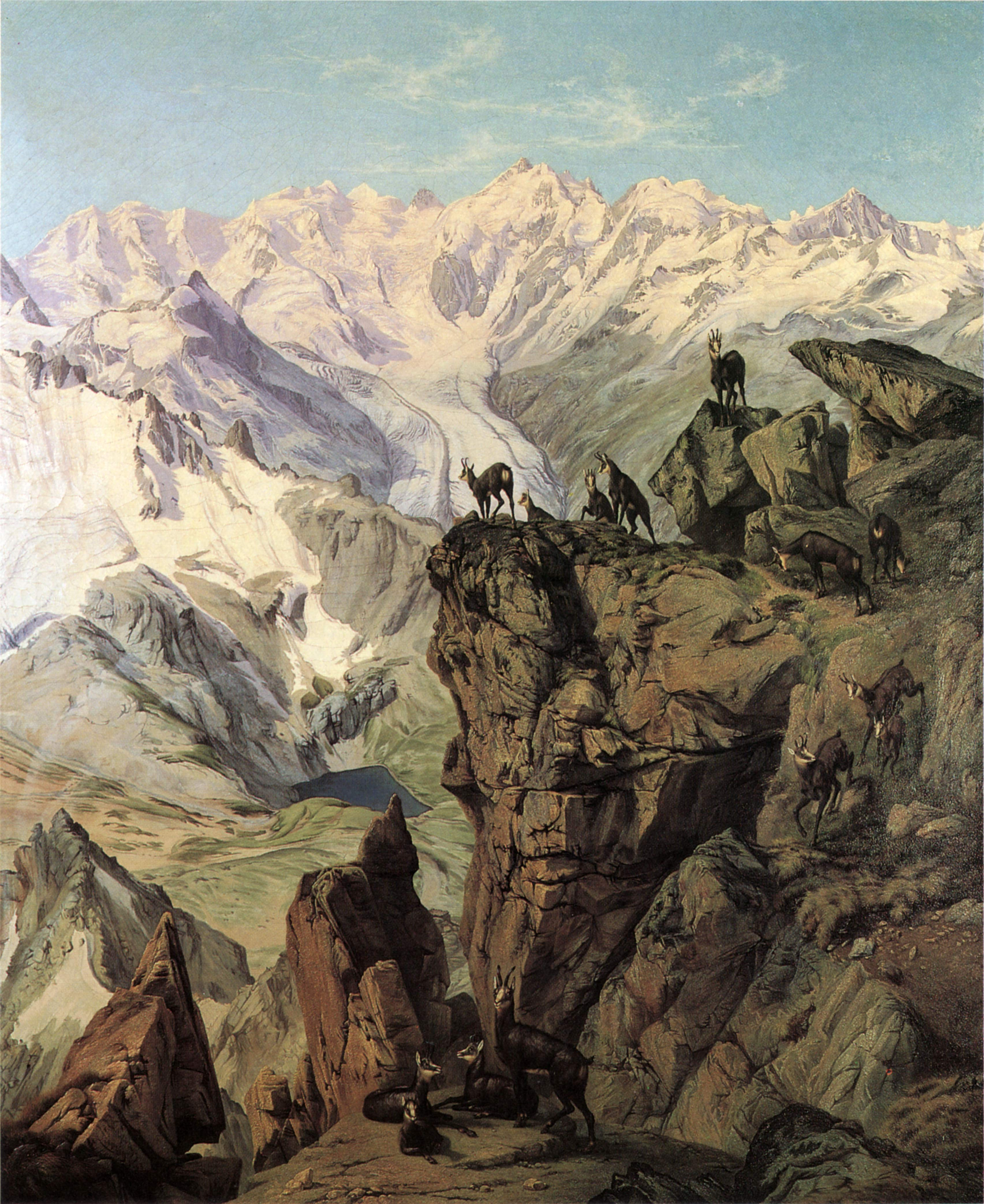 Wilhelm Georgy: Bernina-Gruppe mit Gemsen vom Piz Languard aus, Öl auf Leinwand, 140x112 cm, 1863